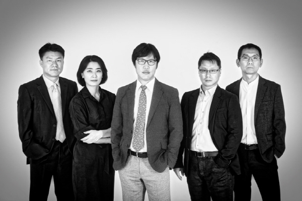 뉴스톱 공동 창업자, 김준일, 송영훈, 지윤성, 이고은, 강양구